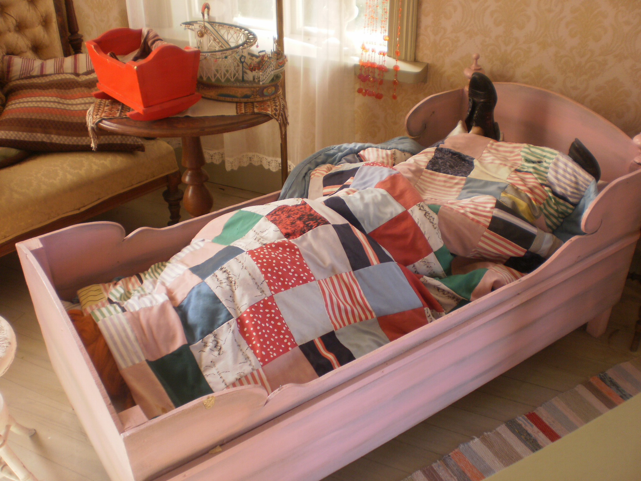 Pippi Longstocking